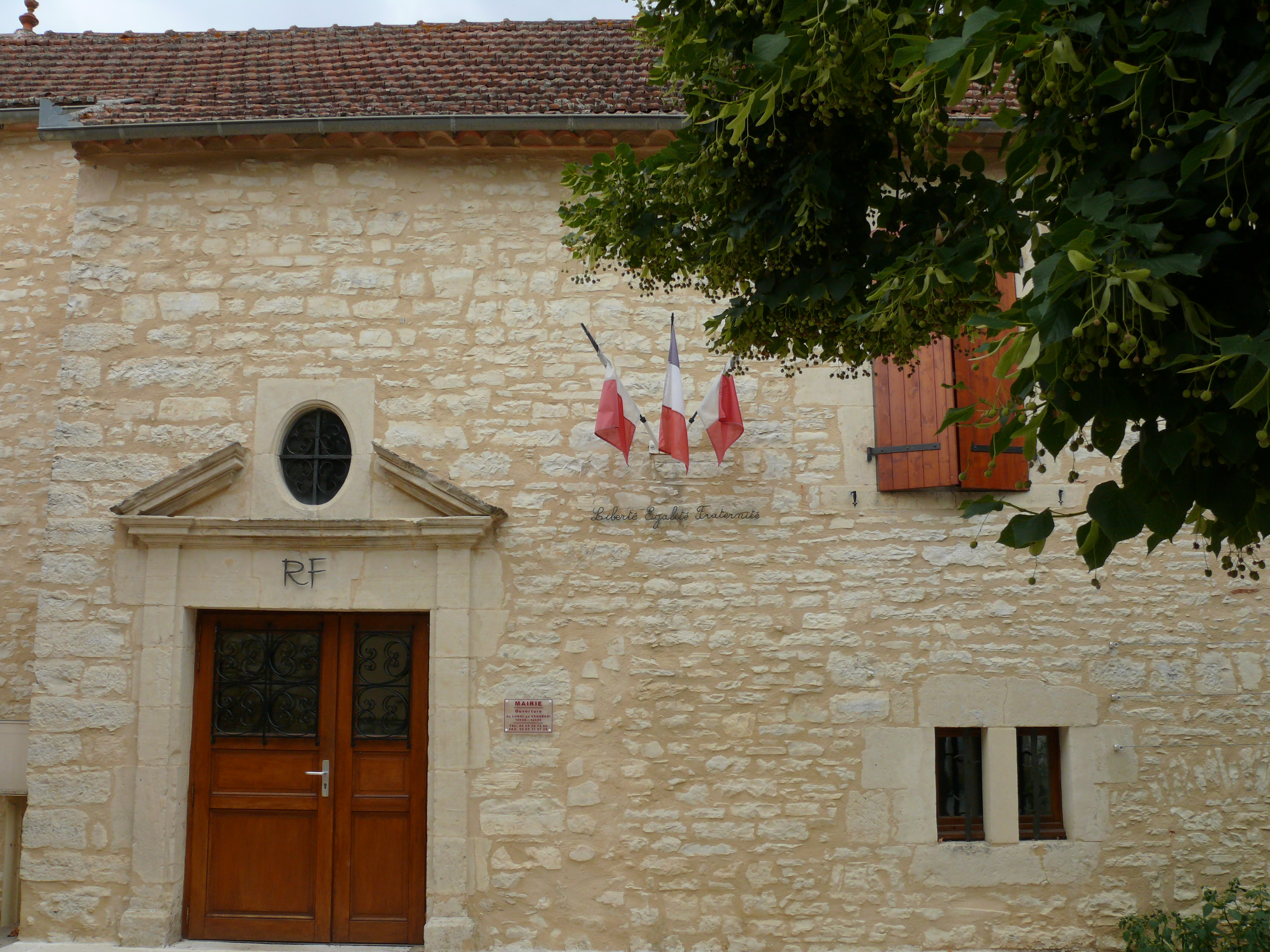 Montgesty - Mairie